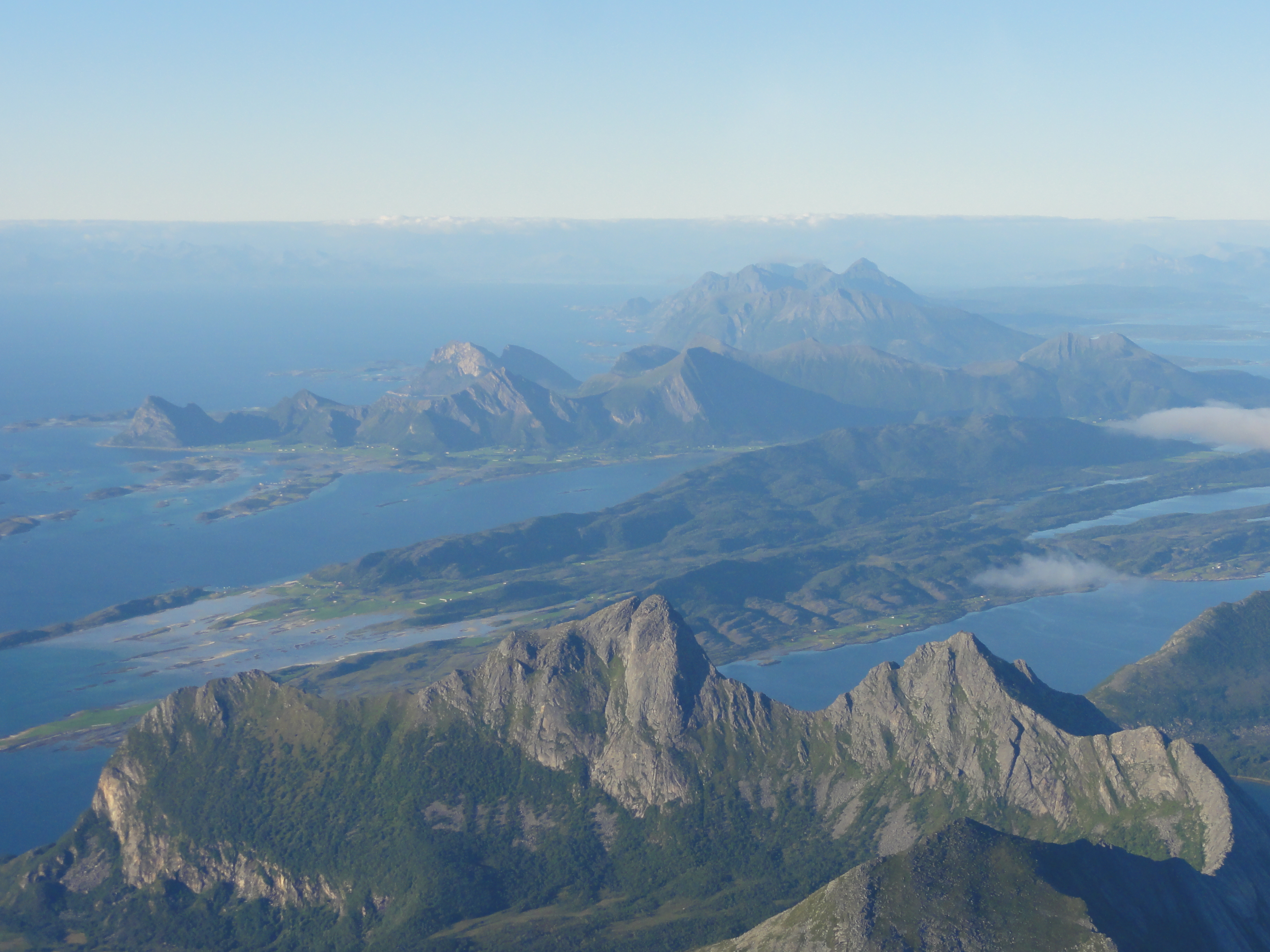 Holkestad er den grønne og flate halvøya midt på Bildet. Øya med de markerte tindene er Engeløys og i bakgrunnen er Lundøya. Skotstindan nærmest og Skotsfjorden mellom disse og Holkestad. Holkestad, Engeløya og Lundøya ligger i den nordvestre delen av Steigen kommune i Nordland.